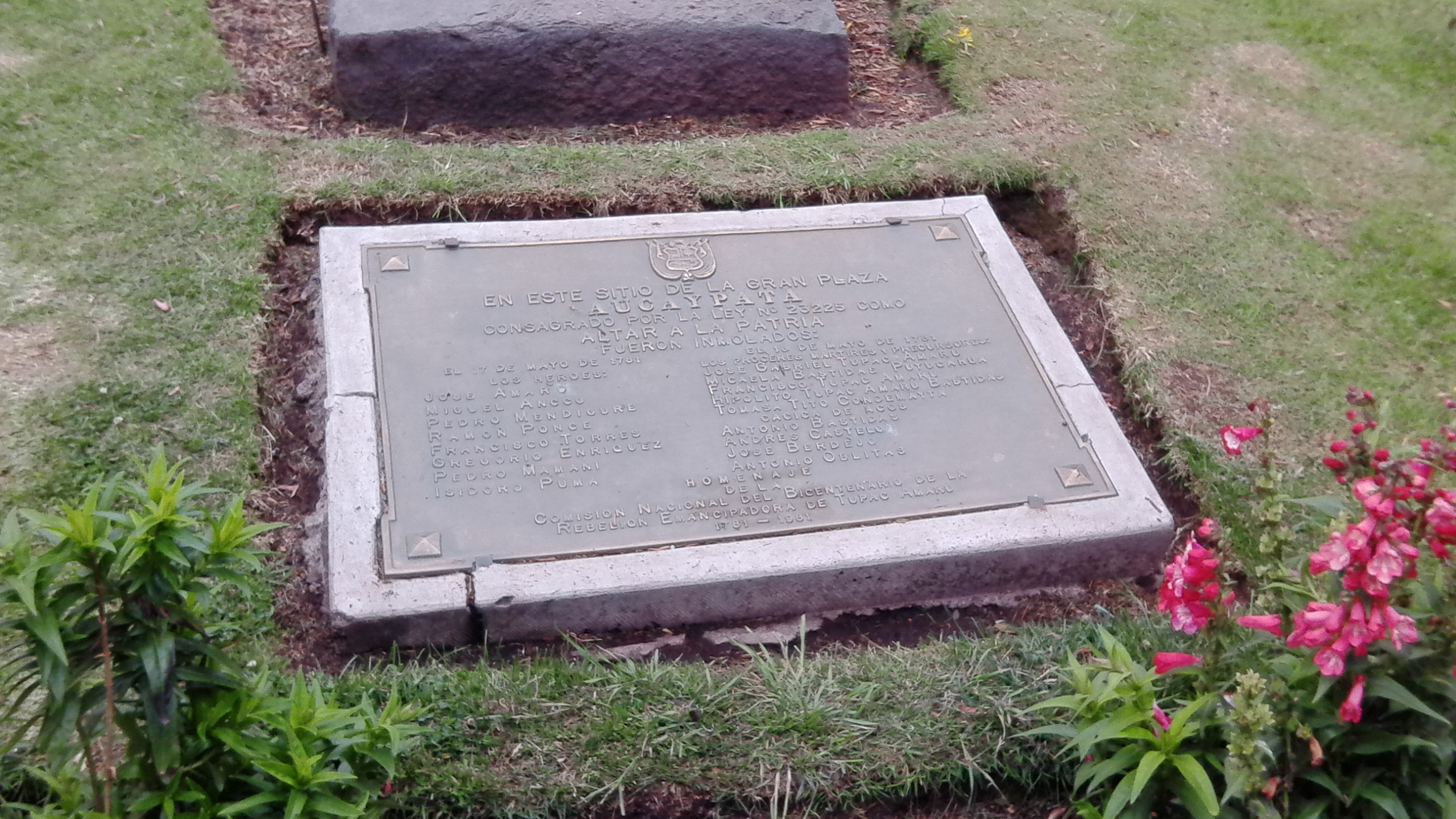 La Tumba de Tupac Amaru II se encuentra en la Plaza de Armas de Cusco.